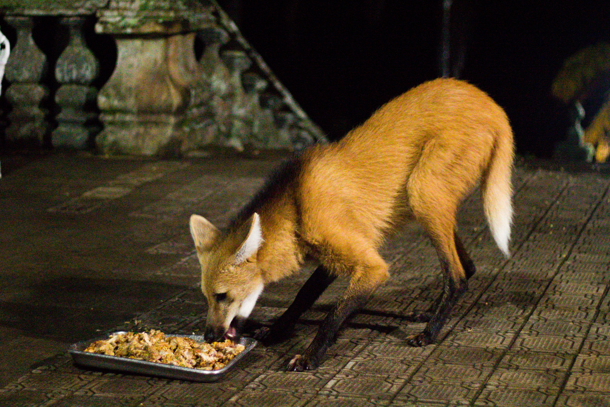 Lobo Guará que vem na maioria das noites visitar o Santuário do Caraça no adro, onde todos se reúnem para vê-lo .